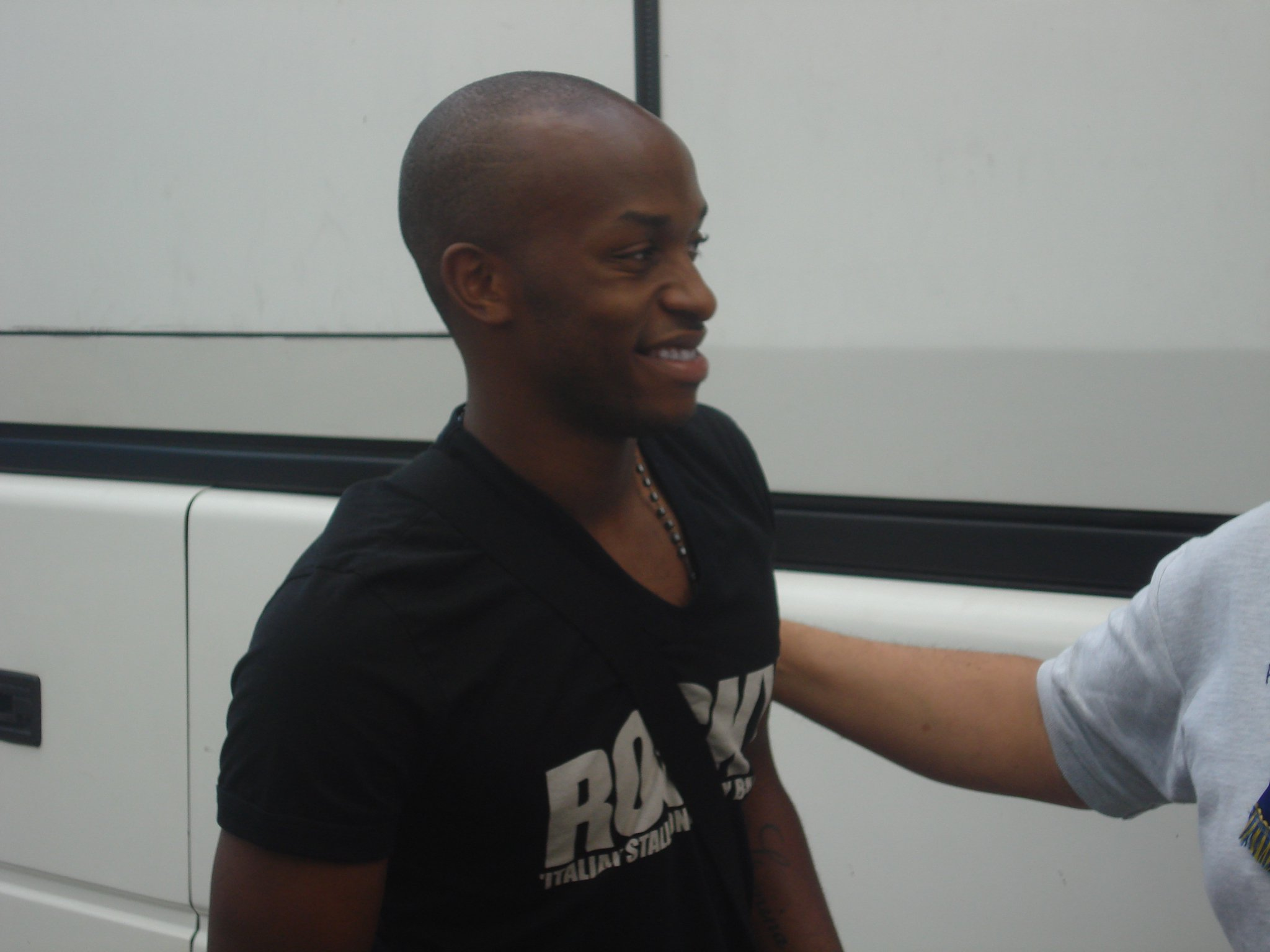 Savio Nsereko alla Juve Stabia